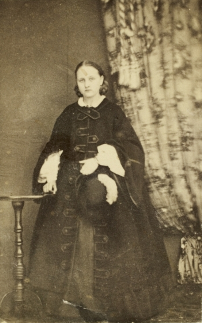 tillhör E. Heikel Stengårdsg. 1 B l. 11 Fanny Churberg 1sta kortet af henne